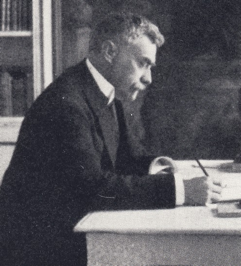 Arkitekt Fredrik Liljekvist (1863-1932)